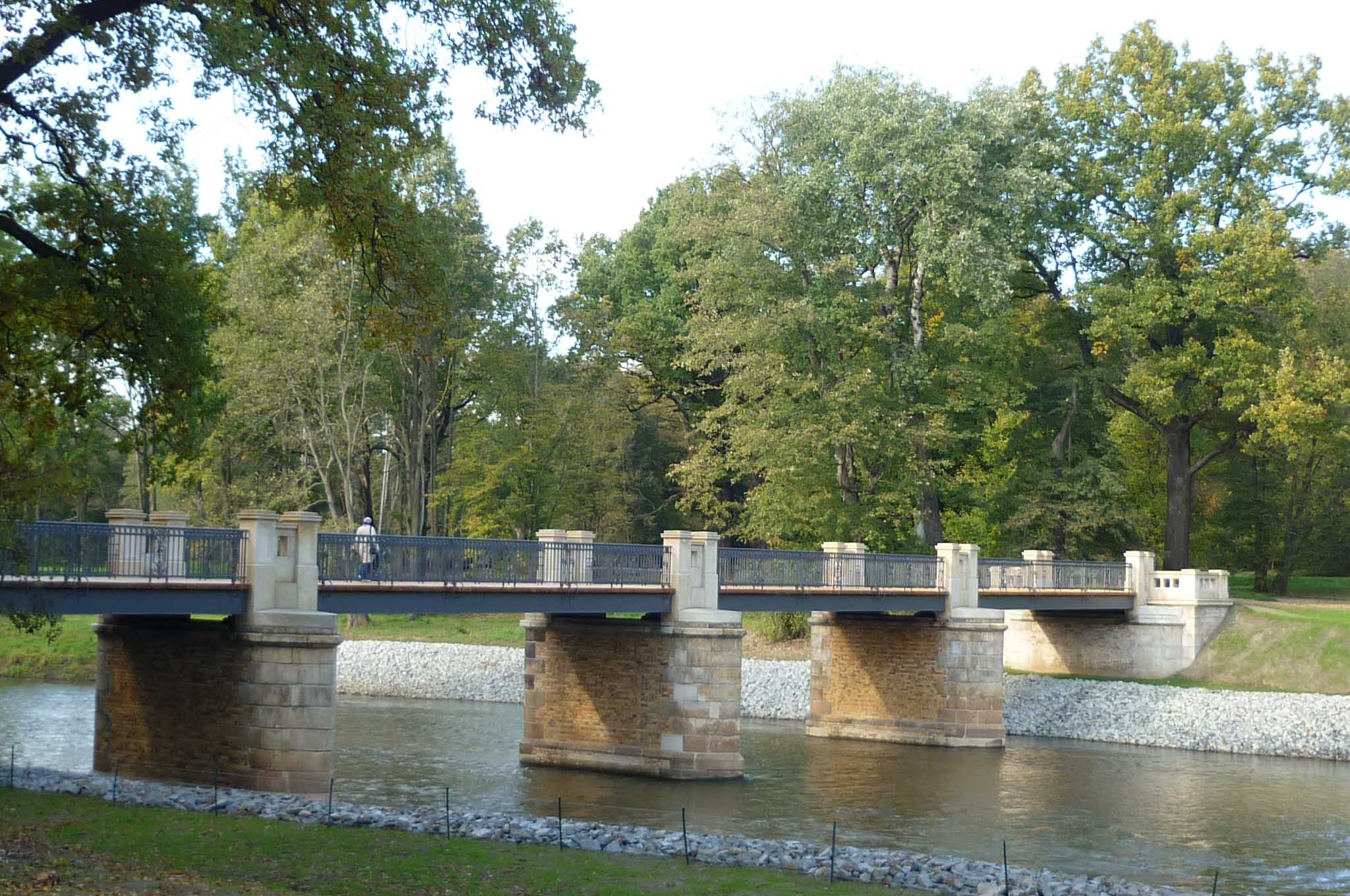 Englische Brücke im Muskauer-Pückler-Park